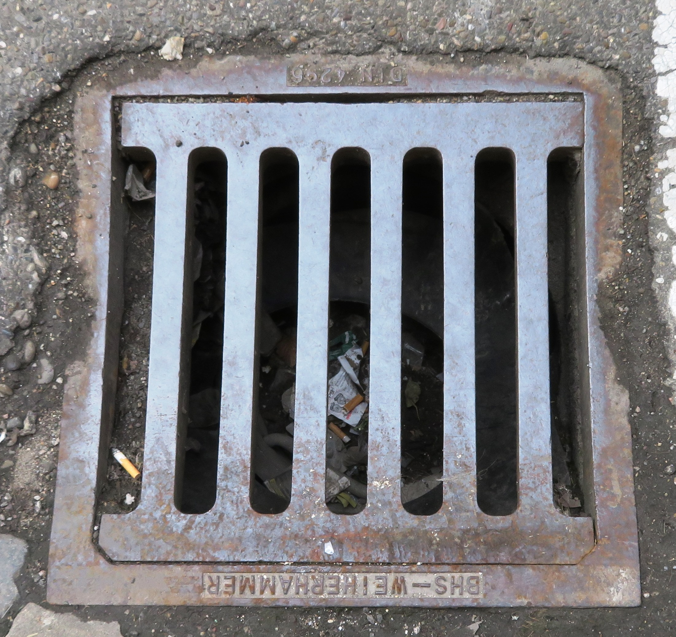 Schachtdeckel in Eichstätt